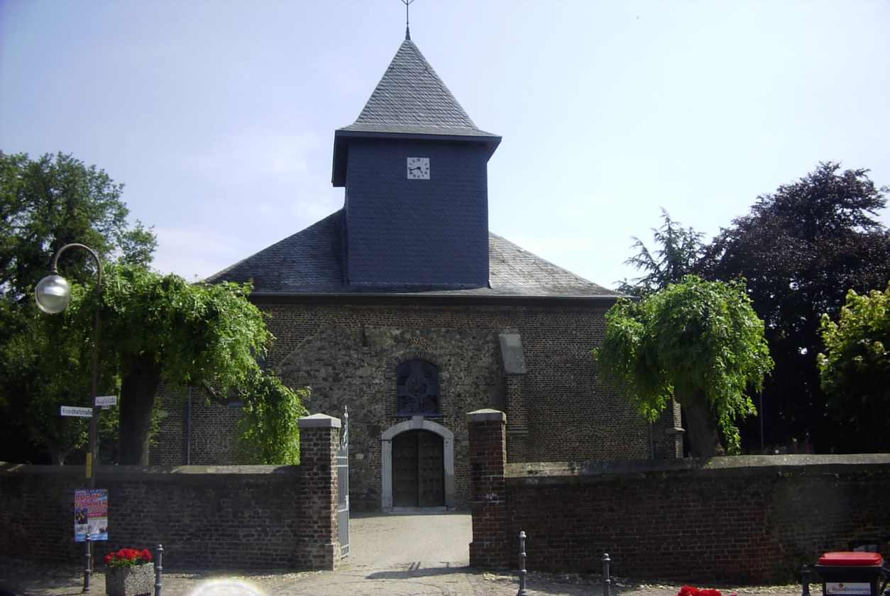 Summary Bildbeschreibung: alte Dorfkirche Körrenzig St. Peter, 15. Jh.. Quelle: eigenes Foto Fotograf/Zeichner: bodoklecksel 16:51, 17. Jun 2006 (CEST) Datum: Juni 2006 Sonstiges: ...